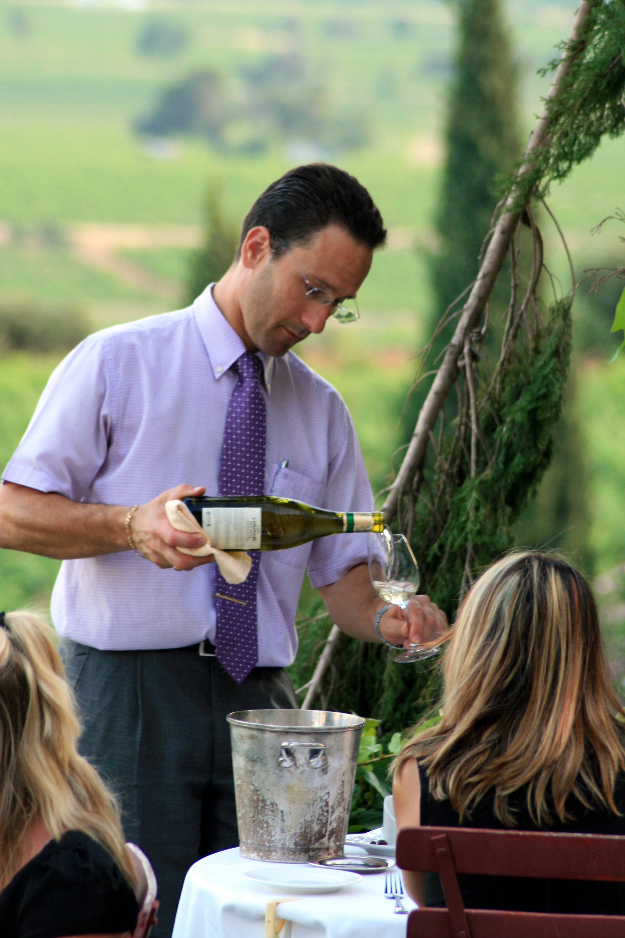 Sommelier de l'Hostellerie du Château des Fines Roches